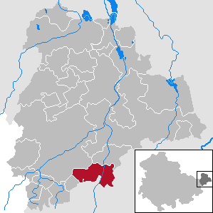 Ponitz in Thuringia - District Altenburger Land